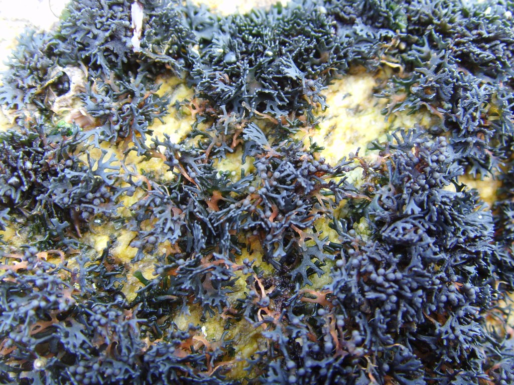 Lichina pygmaea, Île aux Vaches, Esquibien, Finistère, France